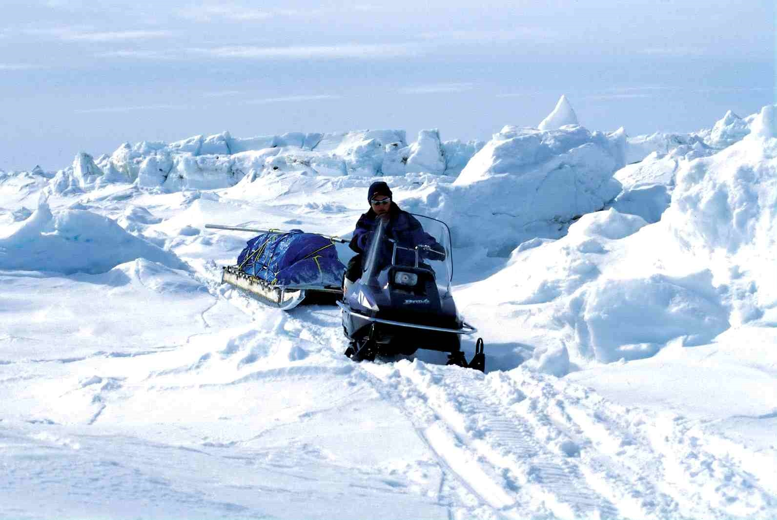 Winter journey with snowmobile, Baffin Island, Nunavut, Canada